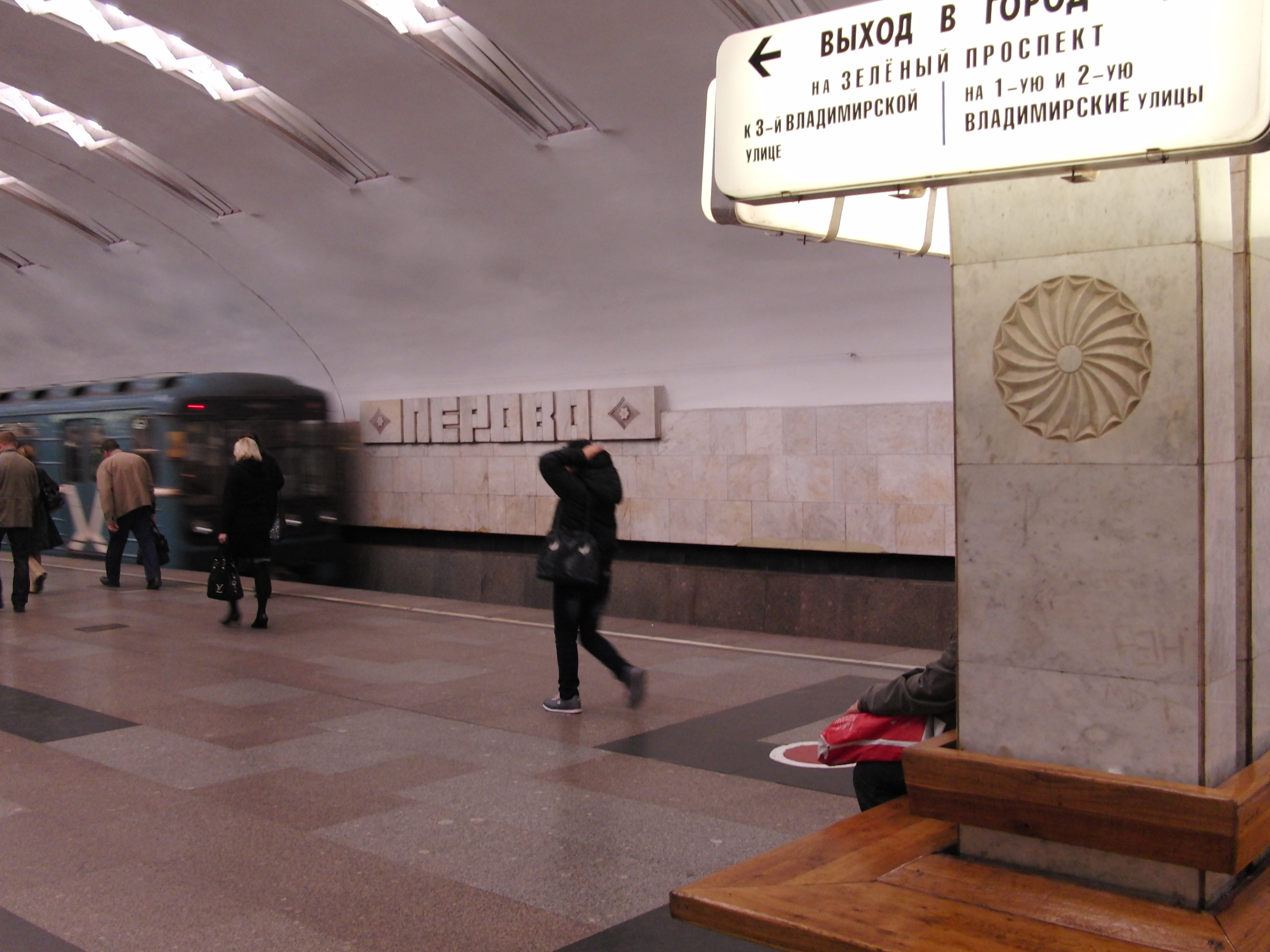 Perovo (Перово)